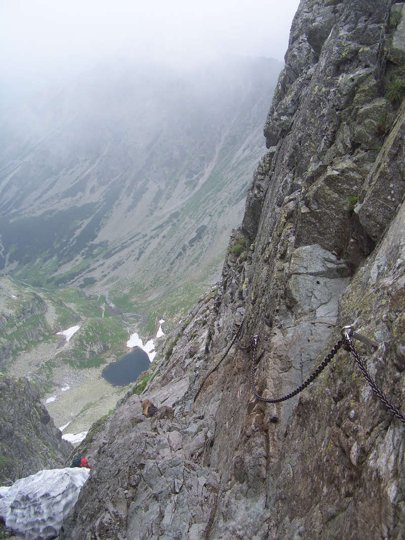 Orla Perć (Tatra Mountains)